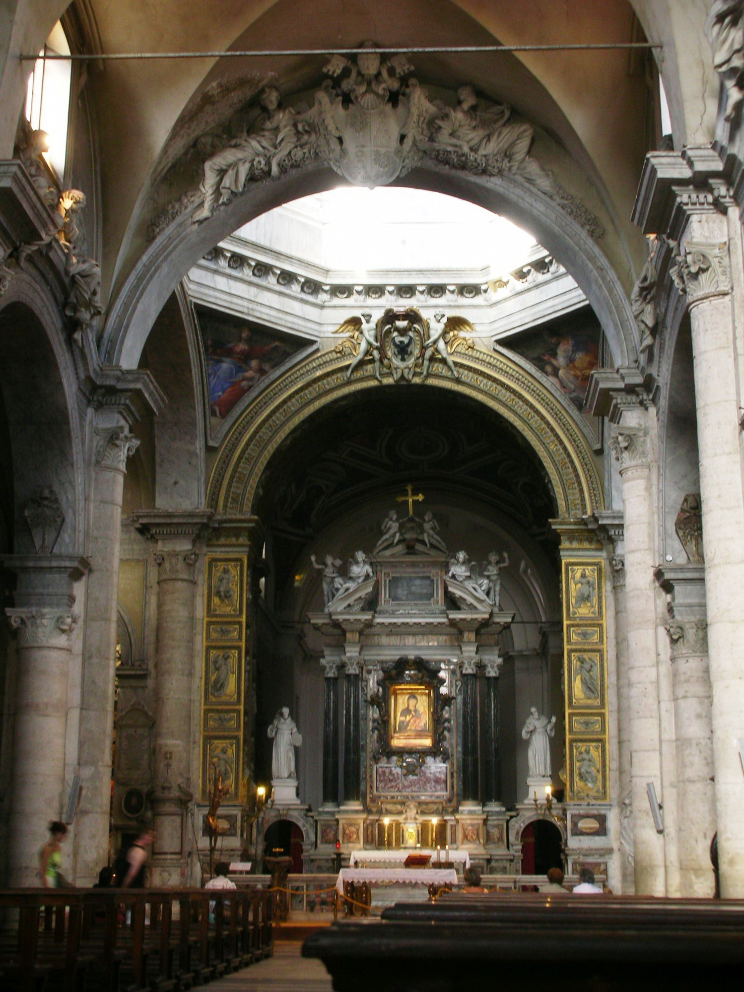 Interior, Santa Maria del Popolo, Rome